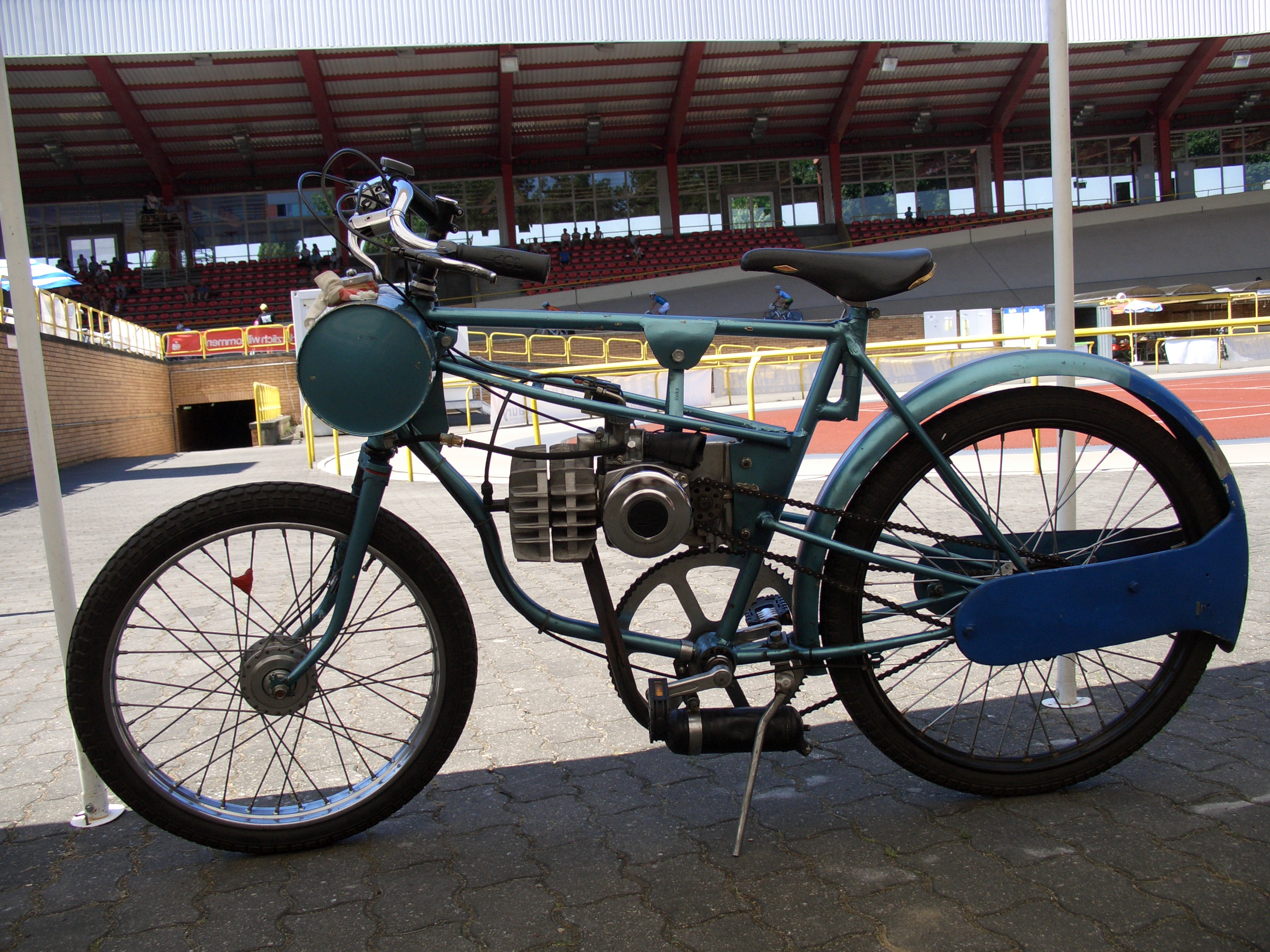 Derny - Leichtmotorrad